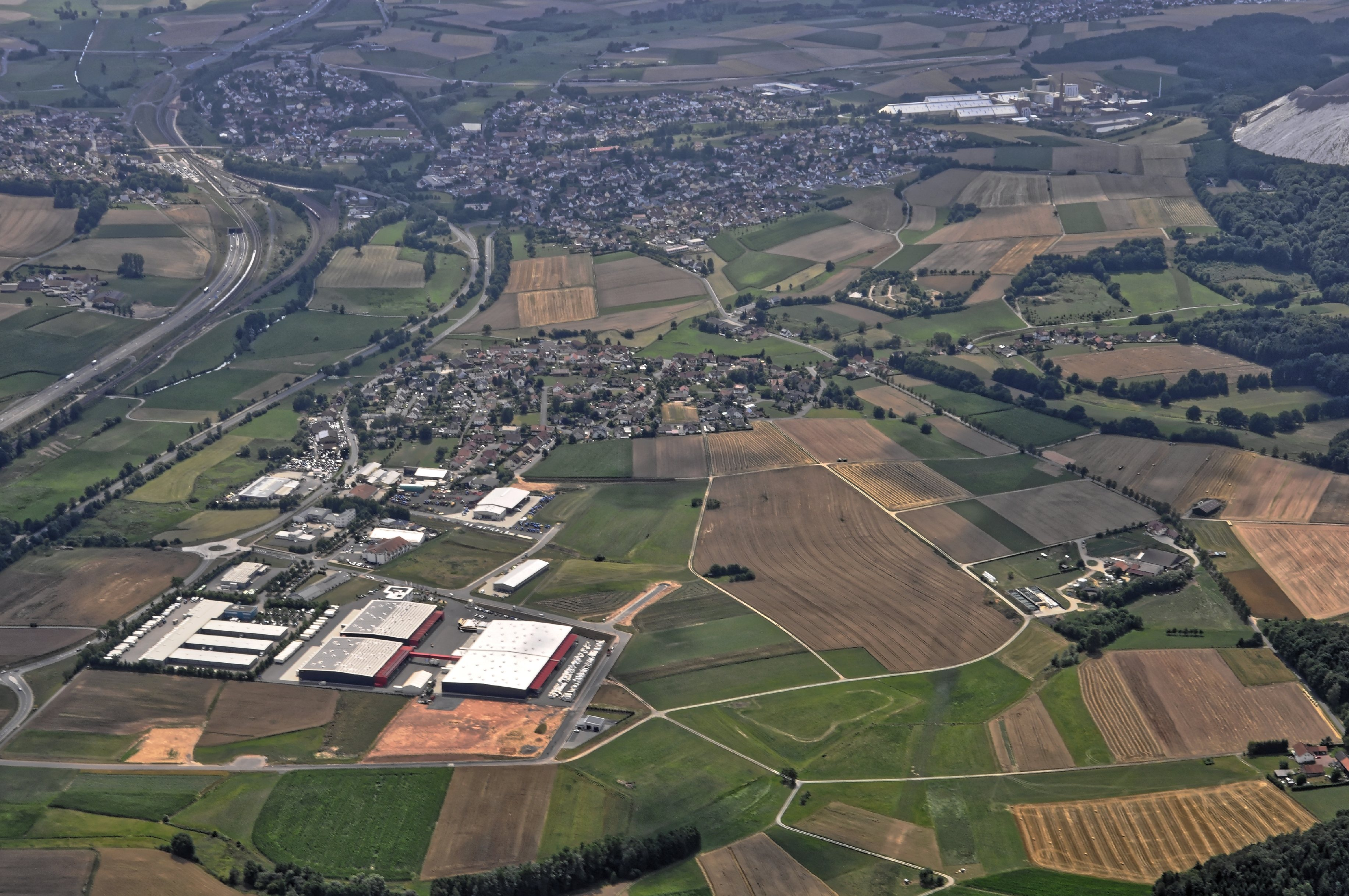 Bilder vom Flug Nordholz-Hammelburg 2015: Blick von Norden auf Dorfborn (vorn) und Neuhof bei Fulda (hinten).